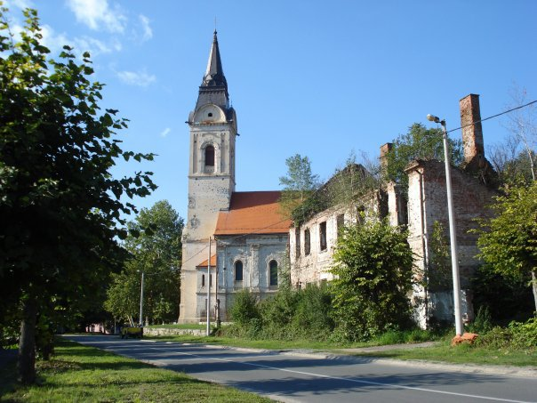 saborna crkva svete trojice u Pakracu, Hrvatska.